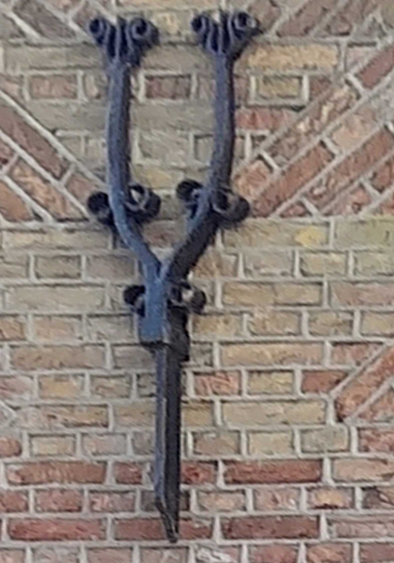 Siermuuranker Dorpsstraat 19 in Ouderkerk aan den IJssel